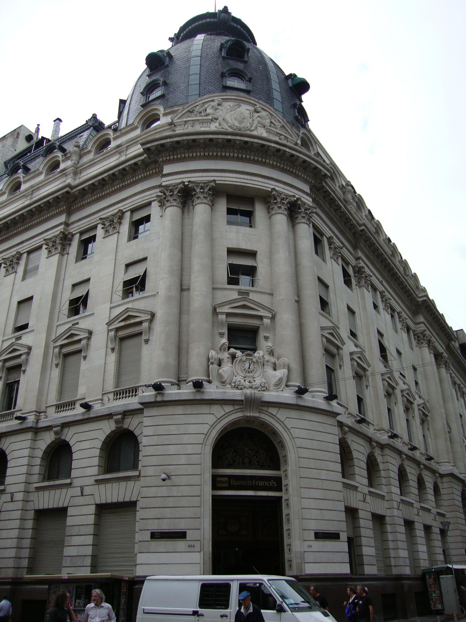 Edificio construido para el Banco Francés del Río de la Plata (hoy BBVA Banco Francés) en 1926. Calles Tte. Gral. Juan D. Perón y Reconquista.